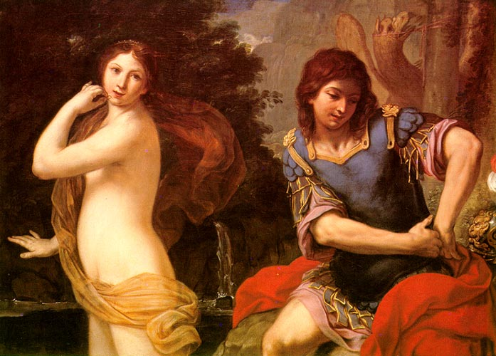 Angelica escapa de Ruggero con el encanto del anillo, Cassa di Risparmio di Cesena